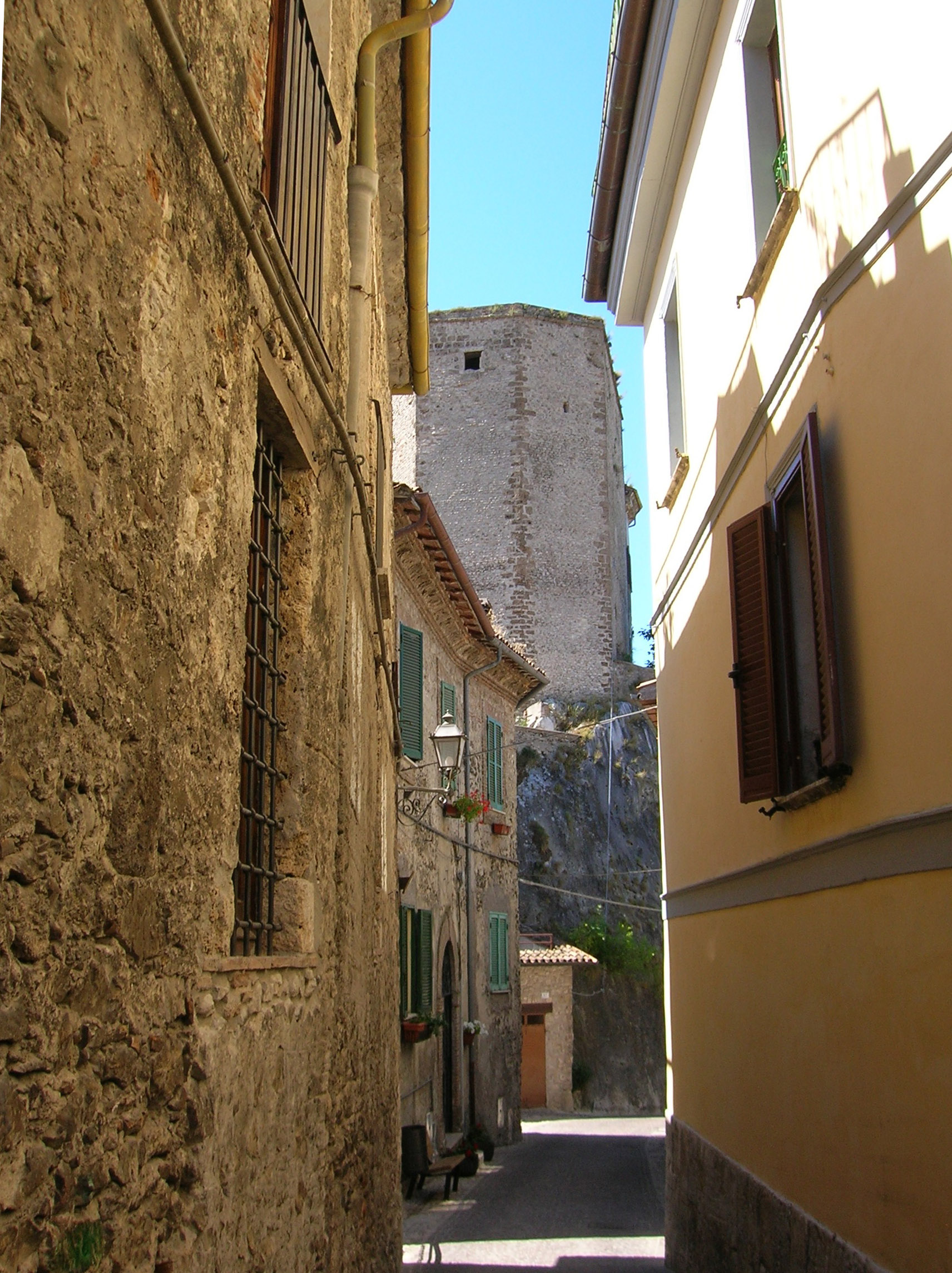 Torre Castel di Tora, Lazio, Italia